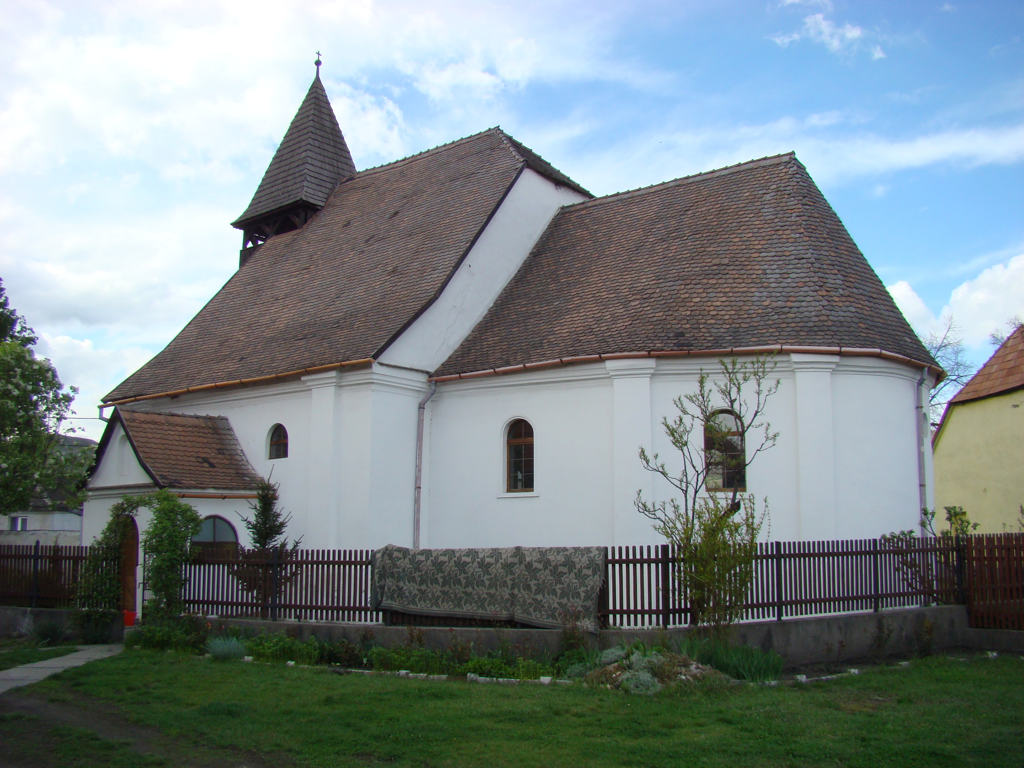 Biserica evanghelică, oraș Copșa Mică, str. Mediașului 100 01